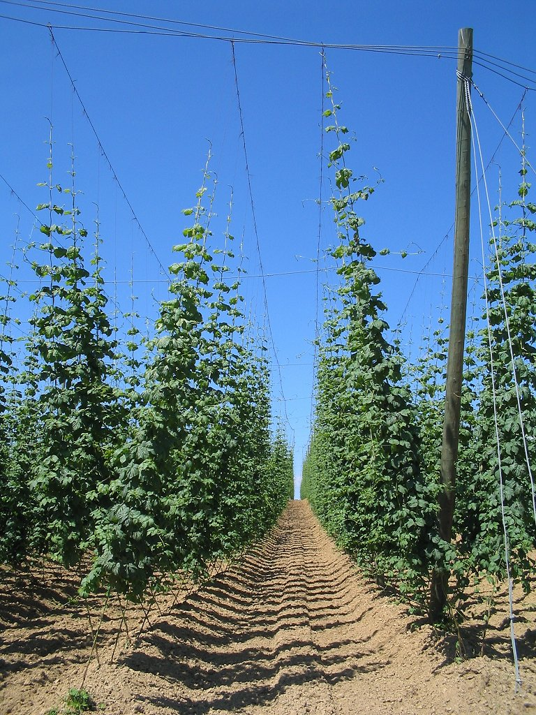 Hopfengarten (Humulus lupulus) in der Holledau Mitte Juni